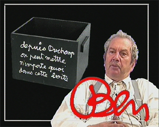 Portrait de Benjamin Vautier